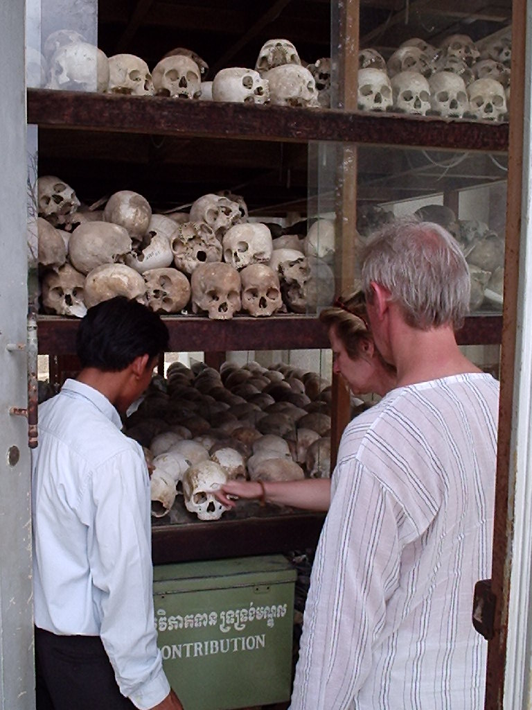 Мемориал Чон Ек (Поля смерти) под Пномпенем, Камбоджа